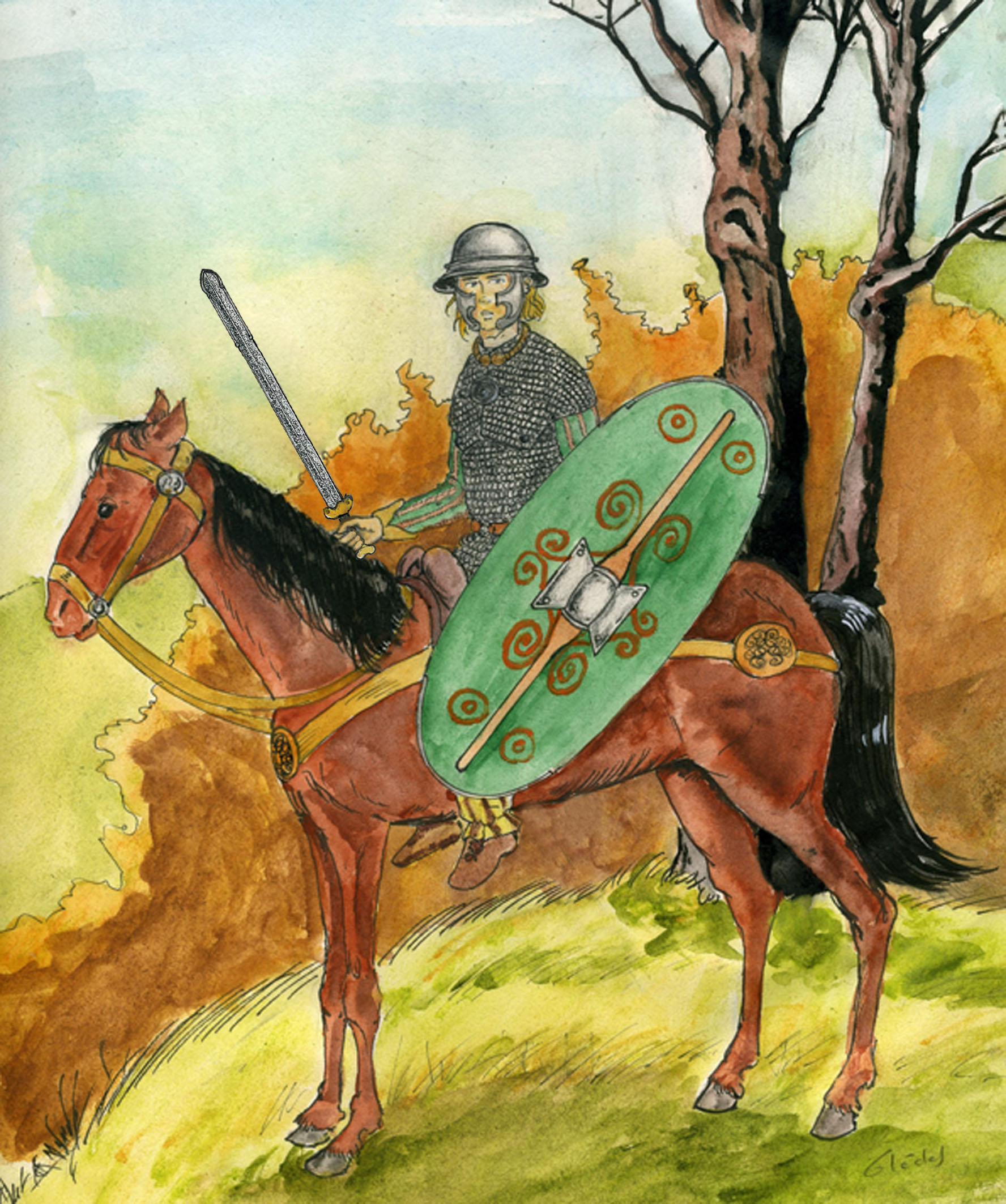 Cavalier celte du I er siècle av J-C